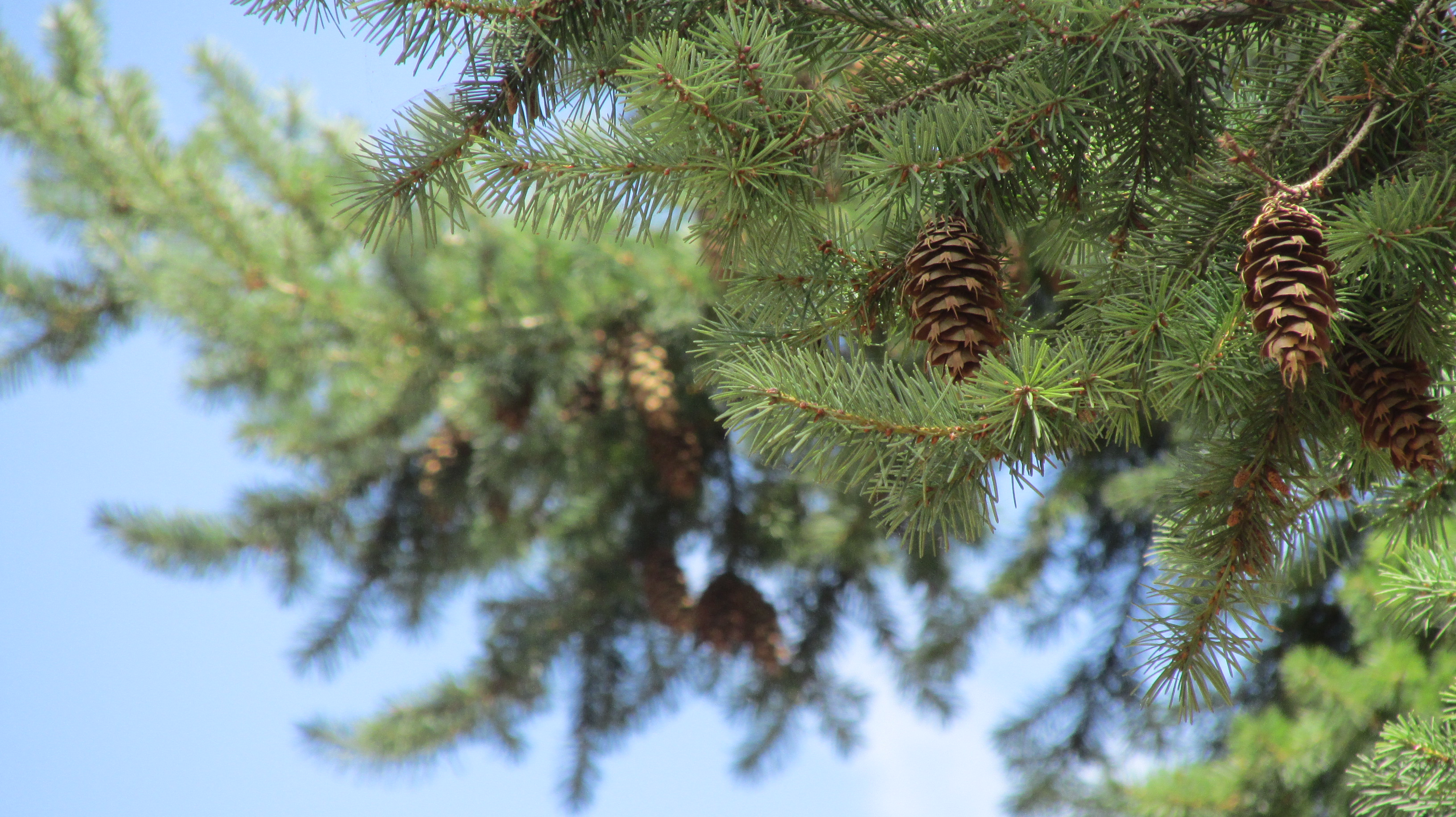 A veces hay que mirar de cerca para ver mejor.